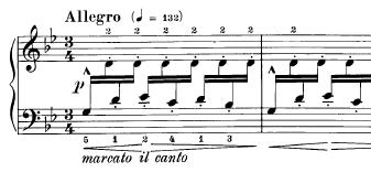 Inicio de Asturias (Leyenda), de Isaac Albéniz